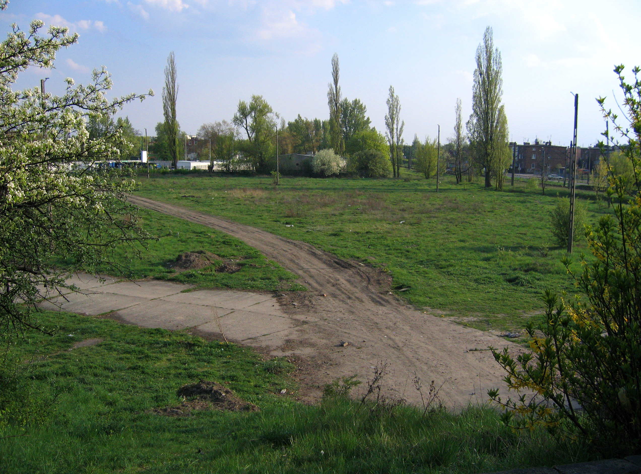 Boisko treningowe na Stadionie na Dębcu, Poznań